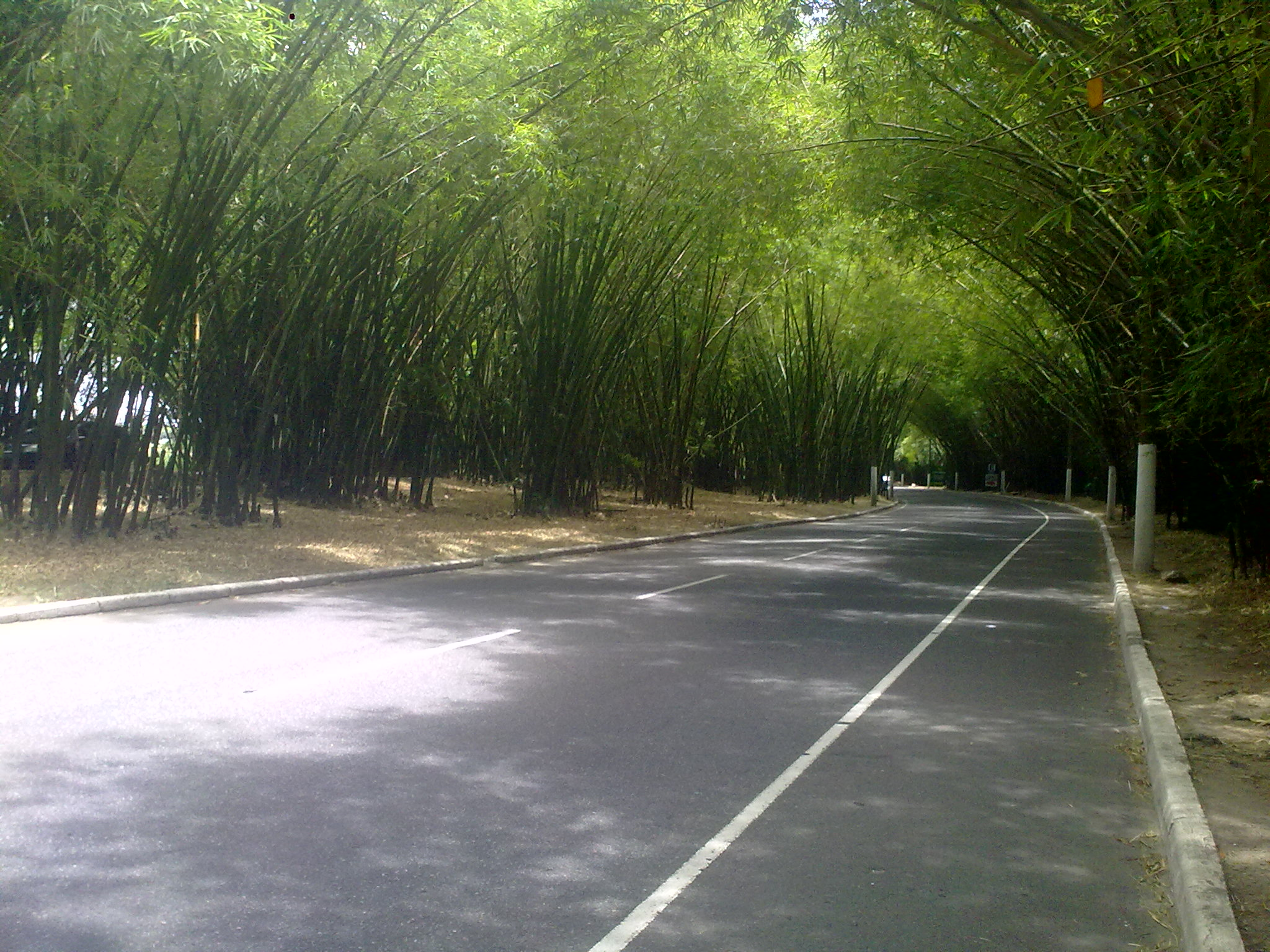 Main road going to the airport in Salvador